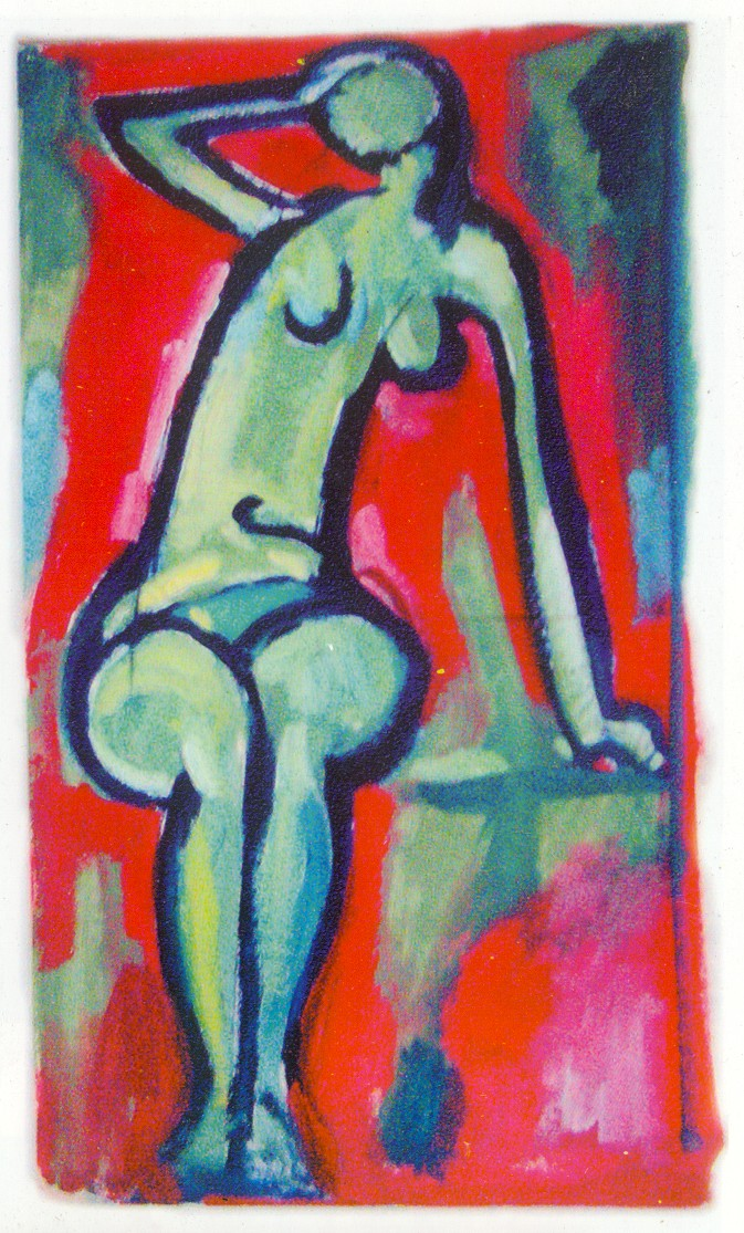 soubor "sedici_akt.jpg" obsahuje fotografii temperomalby Jar.Brožka "Sedící akt". Zobrazuje modrou sedící ženskou postavu obklopenou červenými plochami.